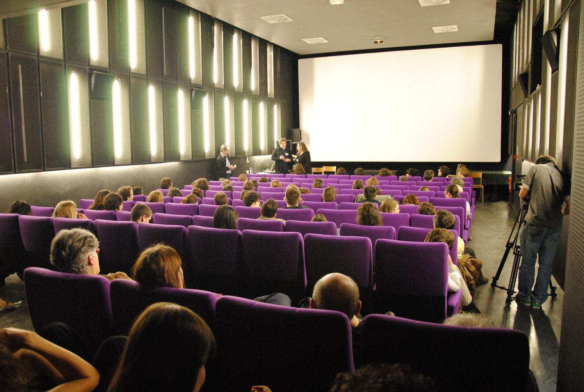 Salle Arts du spectacle, ESAV, Ecole Supérieure d'Audiovisuel, Toulouse (Haute-Garonne, France).